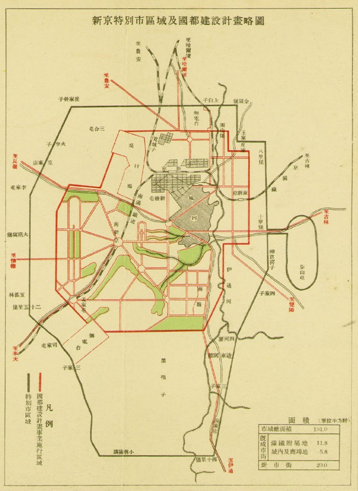 新京特別市・満洲事情案内所共編のパンフレット『新京概観』を加工。